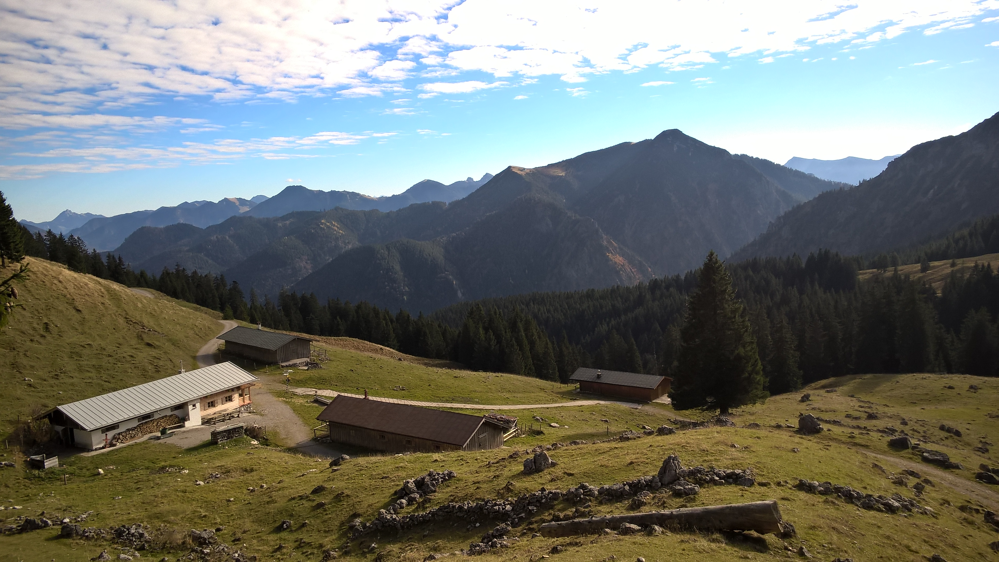 Neuhüttenalm in Bad Wiessee, erste Hälfte des 19. Jahrhundert